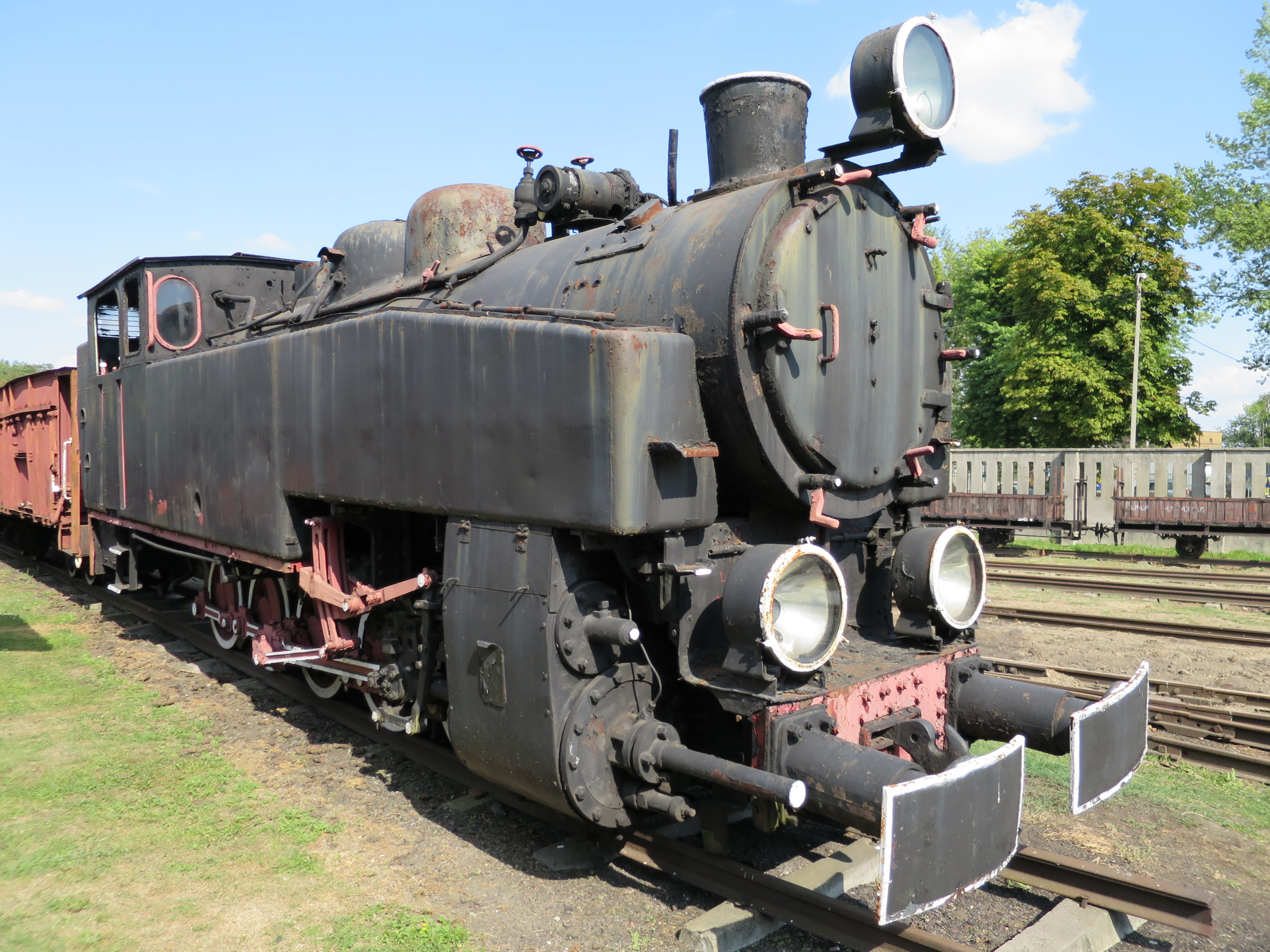 Muzeum Kolei Wąskotorowej w Sochaczewie This photo was taken during Railway Wikiexpedition 2015 set up by Wikimedia Polska Association in cooperation with Fundacja Grupy PKP. You can see all photographs in category Wikiekspedycja kolejowa 2015.